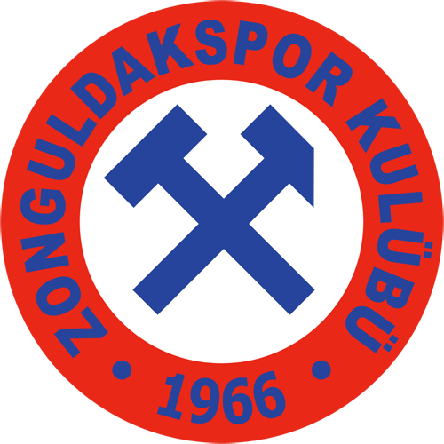 Logo Zonguldakspor